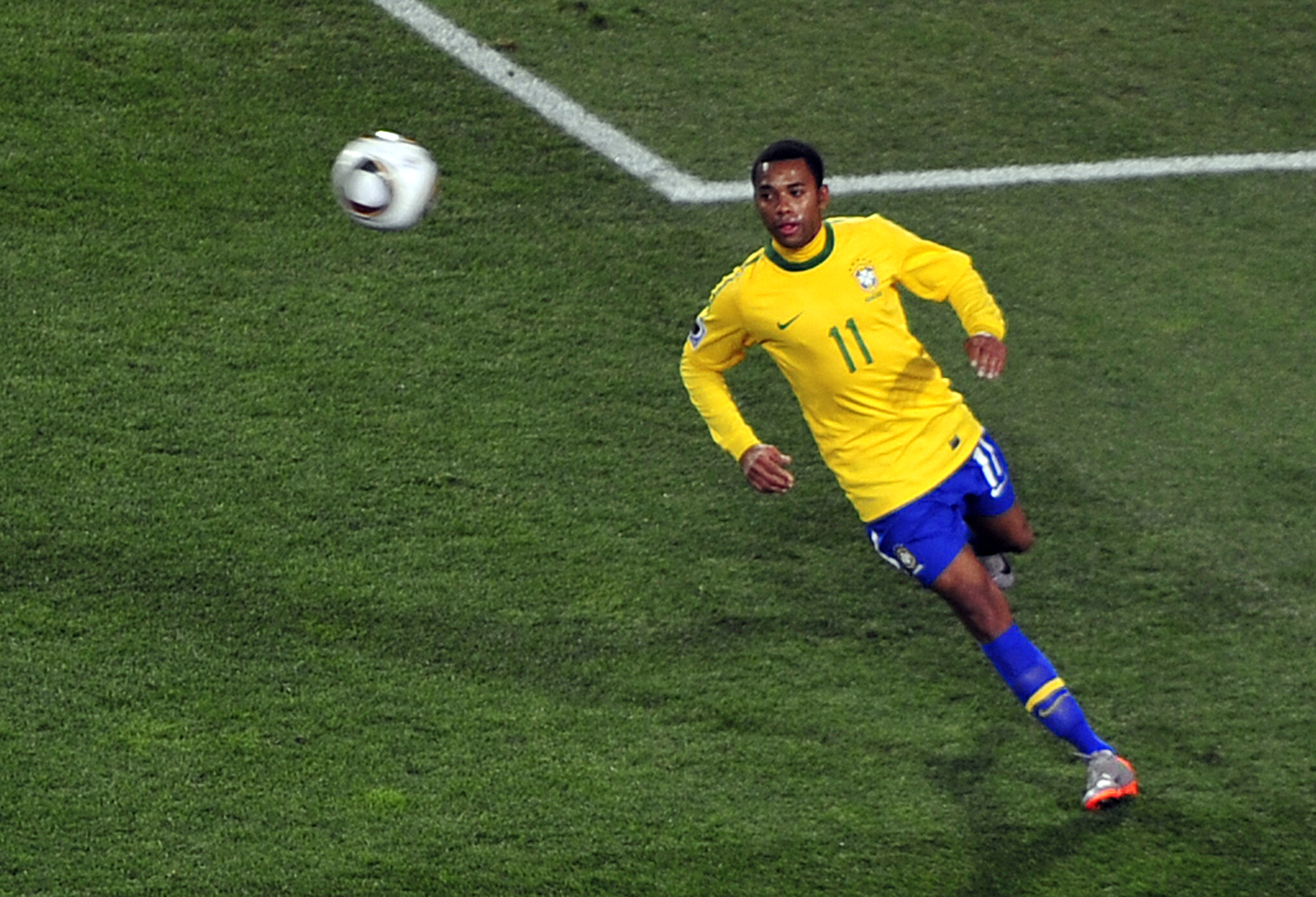 Joanesburgo - Robinho, um dos destaques da seleção brasileira na vitória sobre o Chile.